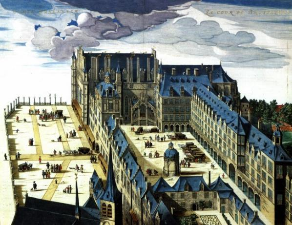 vue du palais ducal du Coudenberg à son appogée